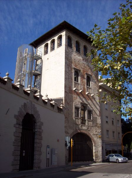 Udine (Friuli Venezia Giulia - Italy), Torre Santa Maria o Porta Torriani del 1295 IV cinta muraria.